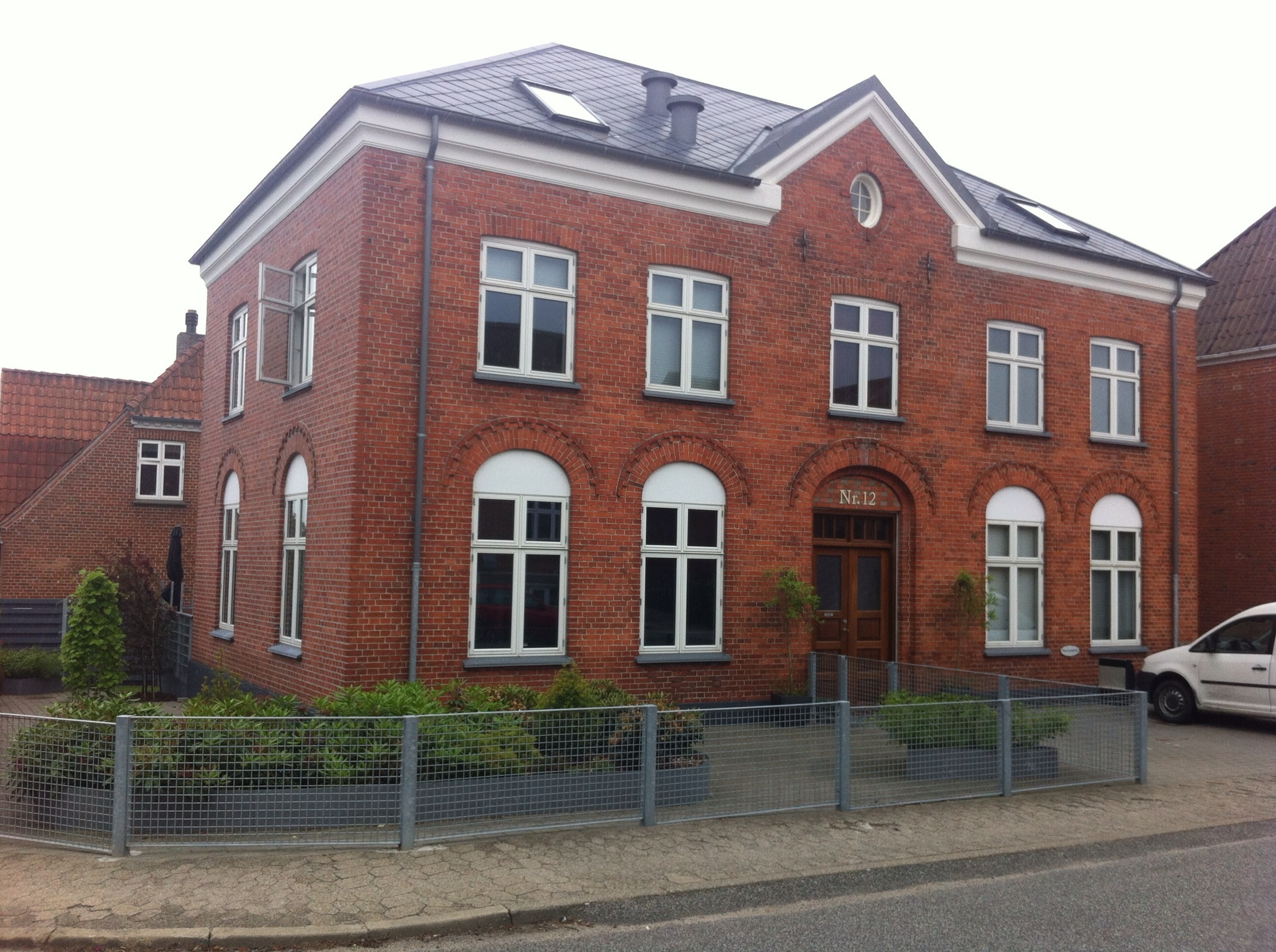 Den Gamle Hadsund Teknisk Skole, Skolegade 12, 9560 Hadsund.